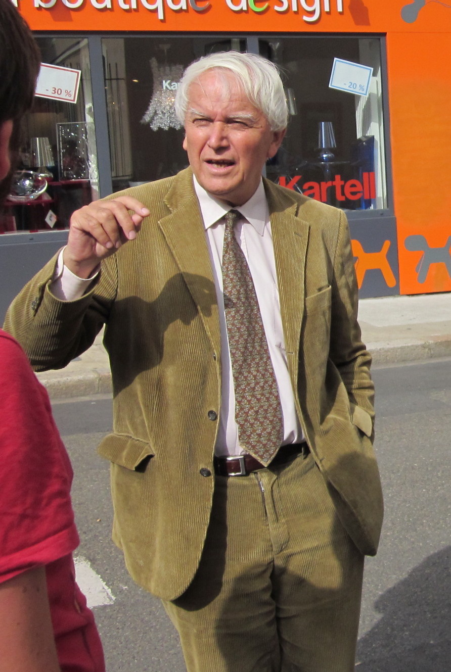 Jean-Claude Boulard, Maire du Mans, après la première Culture Pride de la ville, le 09 juillet 2011.